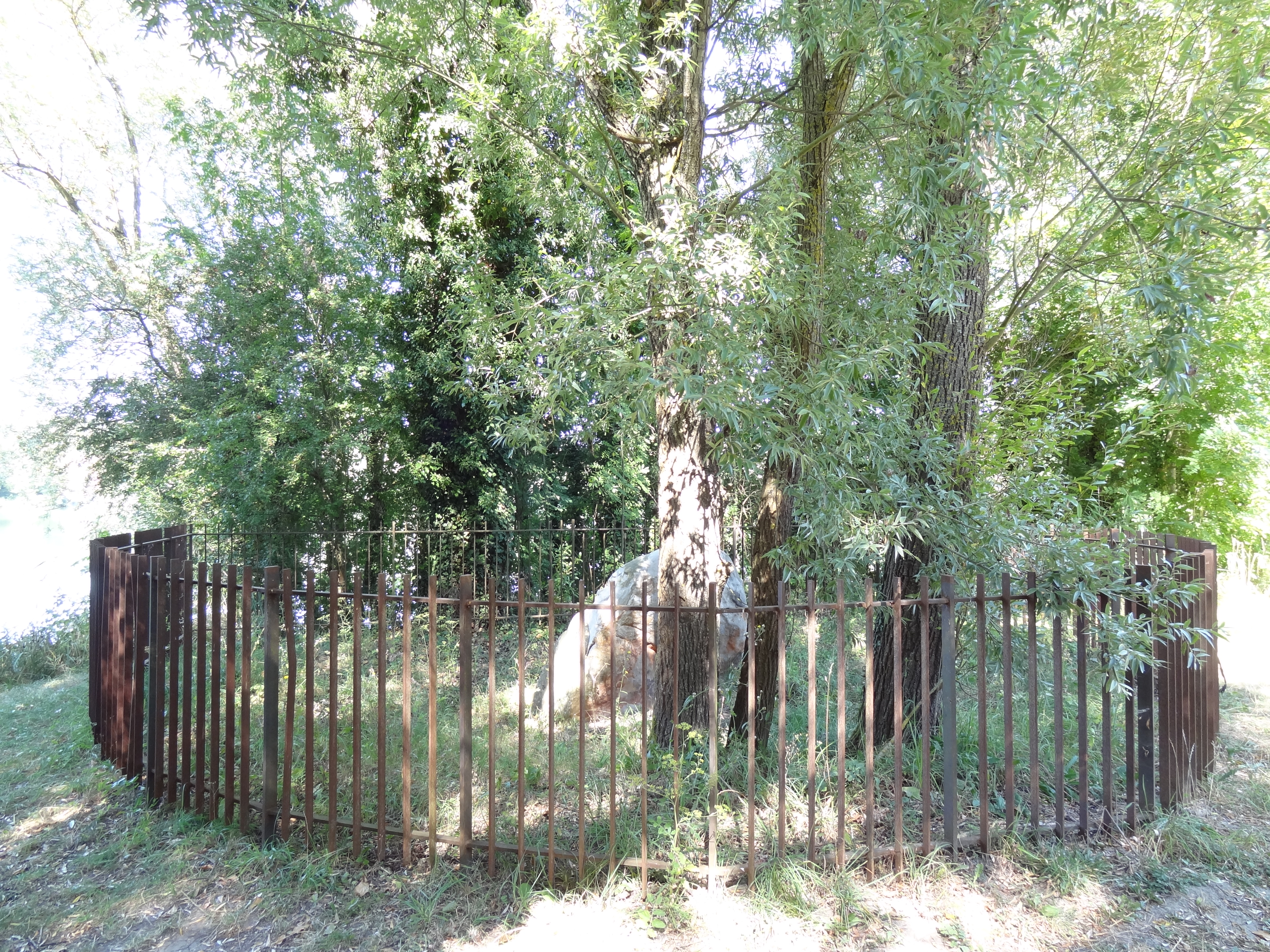 Menhir du Pierre-Beaumirault, vue d'ensemble du site protégé. .